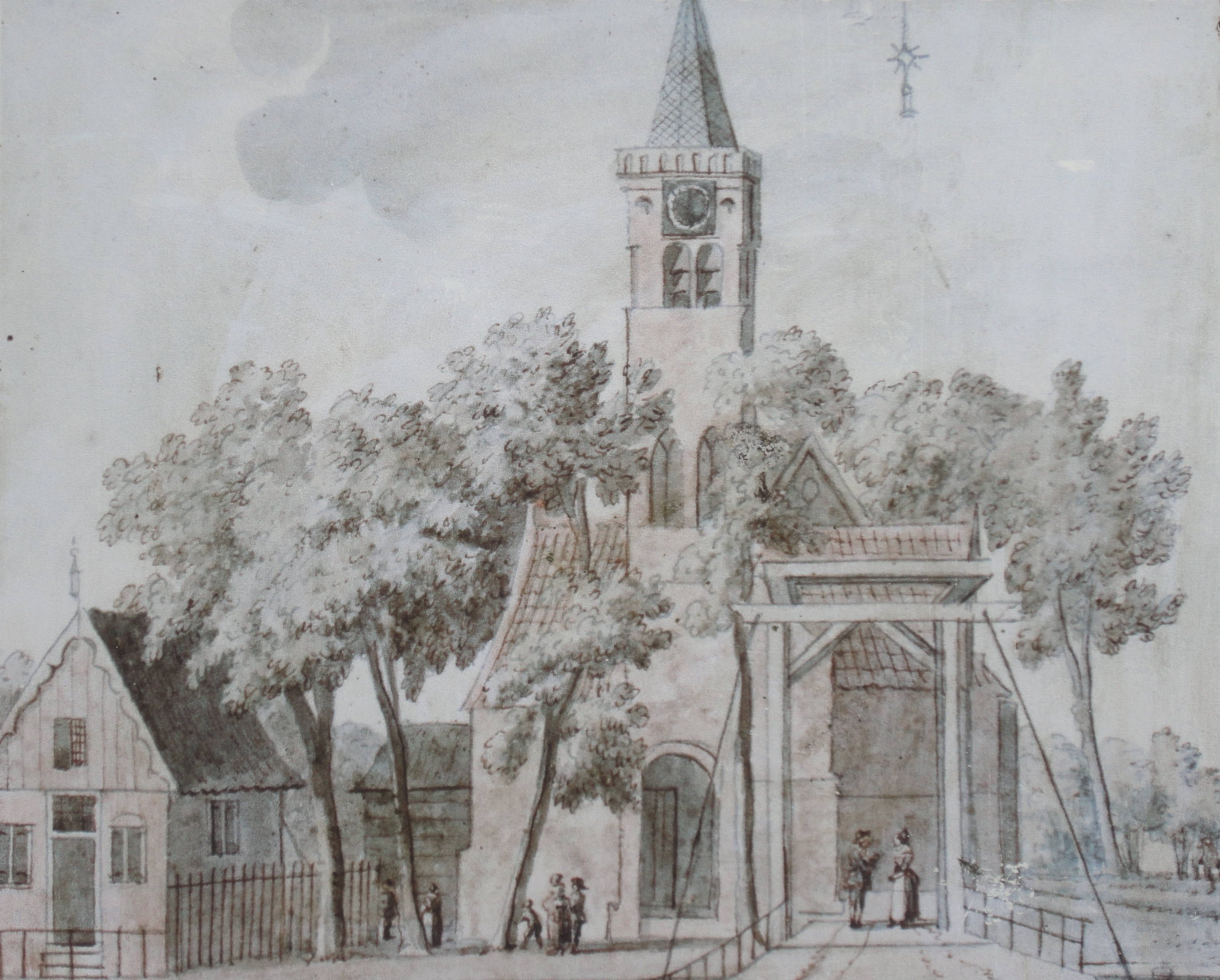 Die Dorfkirche Grootschermer in historischer Darstellung vor mindestens 100 Jahren